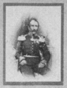 Kommandeur des Kurhessischen Jäger-Bataillons Nr. 11